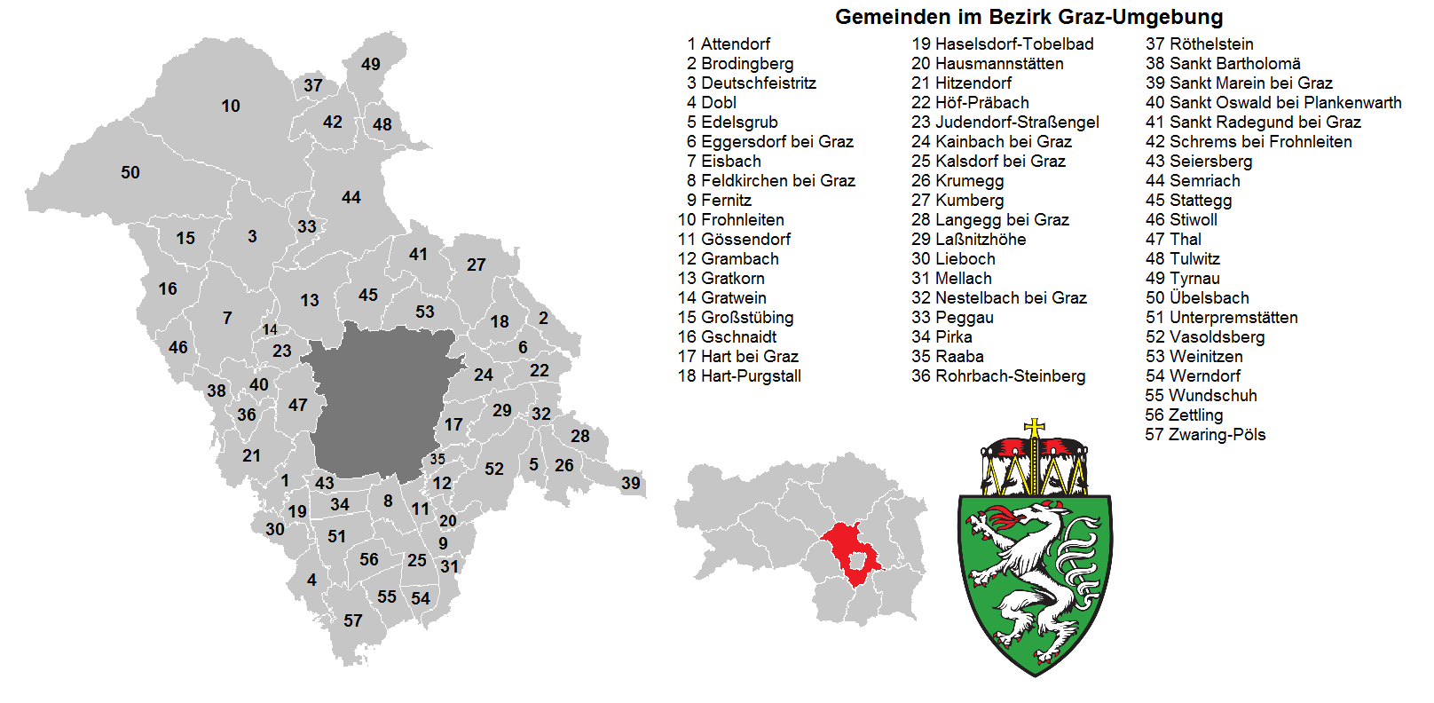 Bezirk Graz-Umgebung